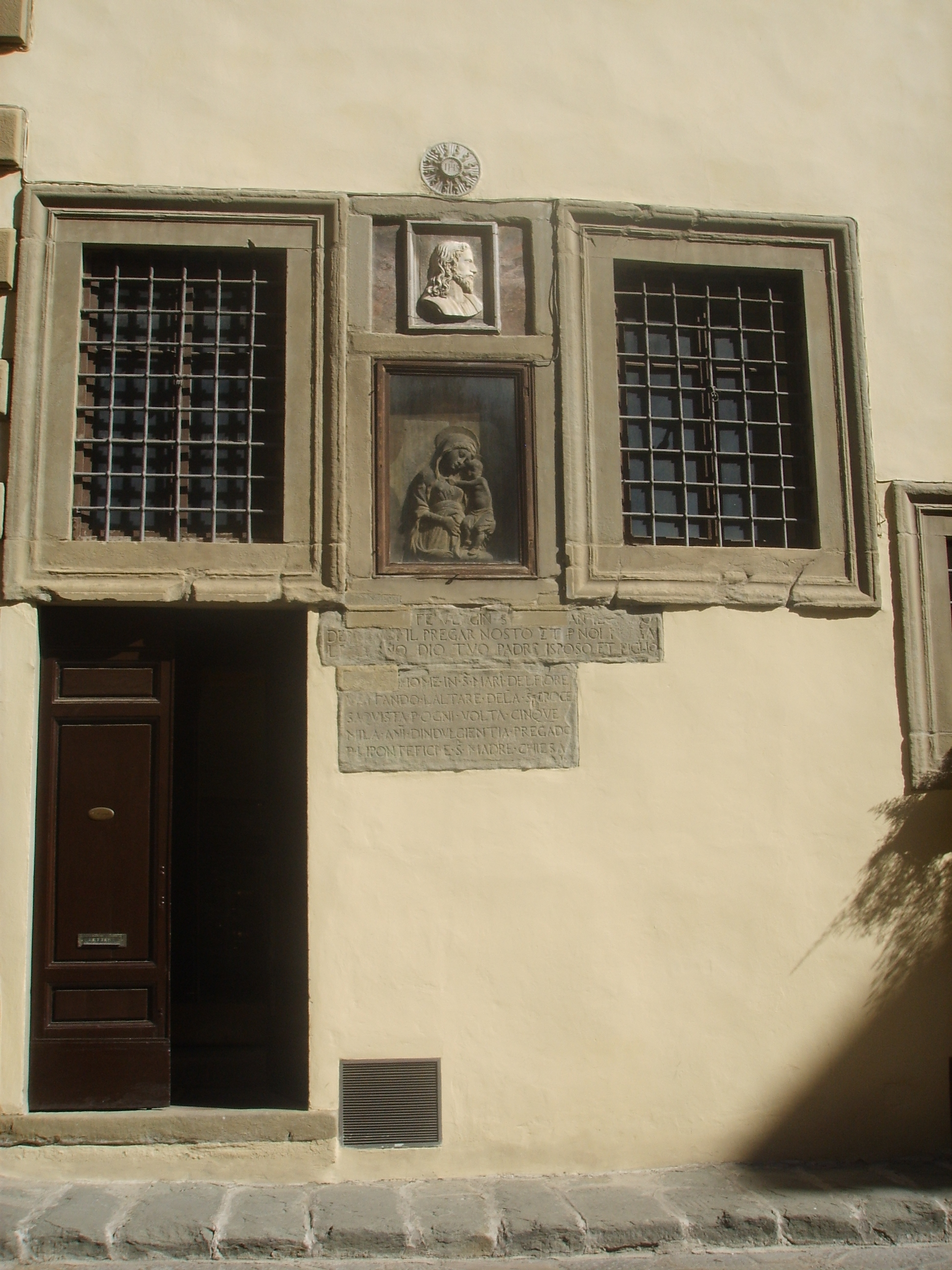 Piazza del Limbo in Florence, italy